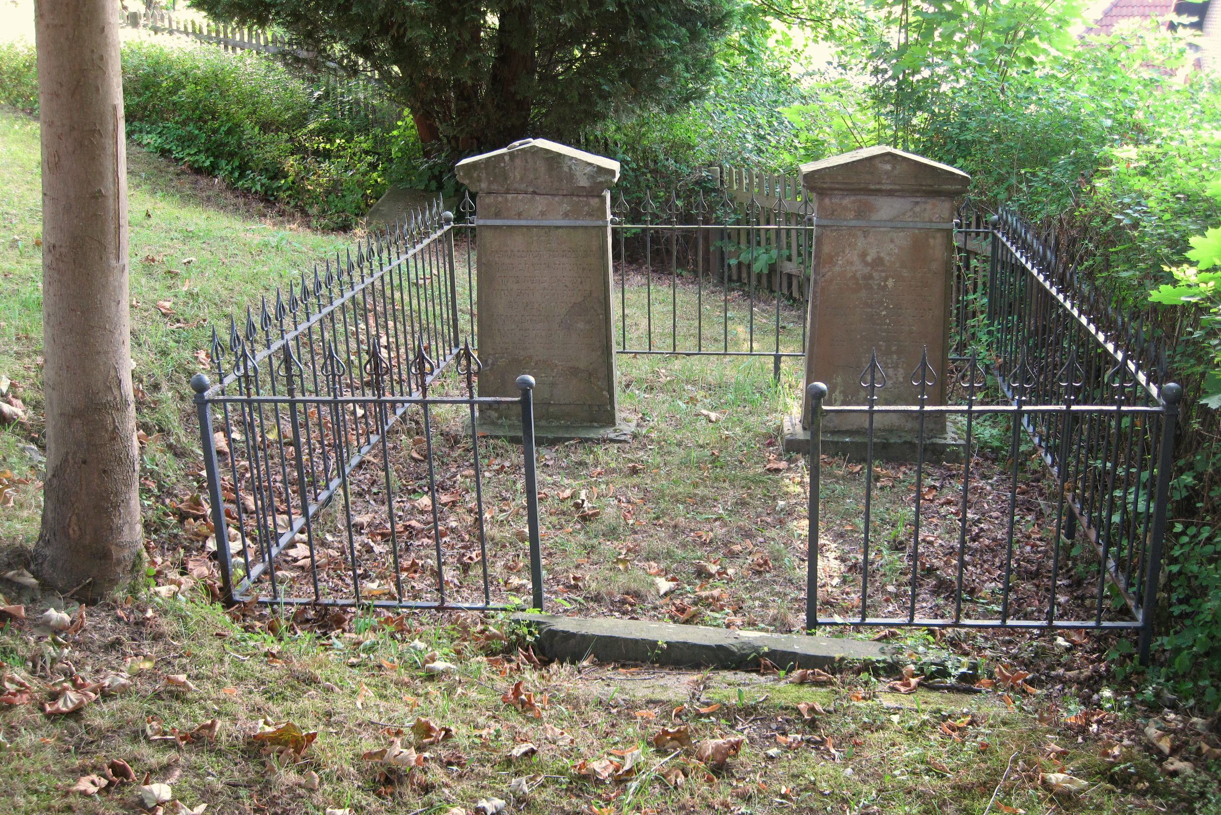 Jüdischer Friedhof, Dechant-Amecke-Weg in Balve. This image shows a heritage building in Germany, located in the North Rhine-Westphalian city Balve (no. 30).